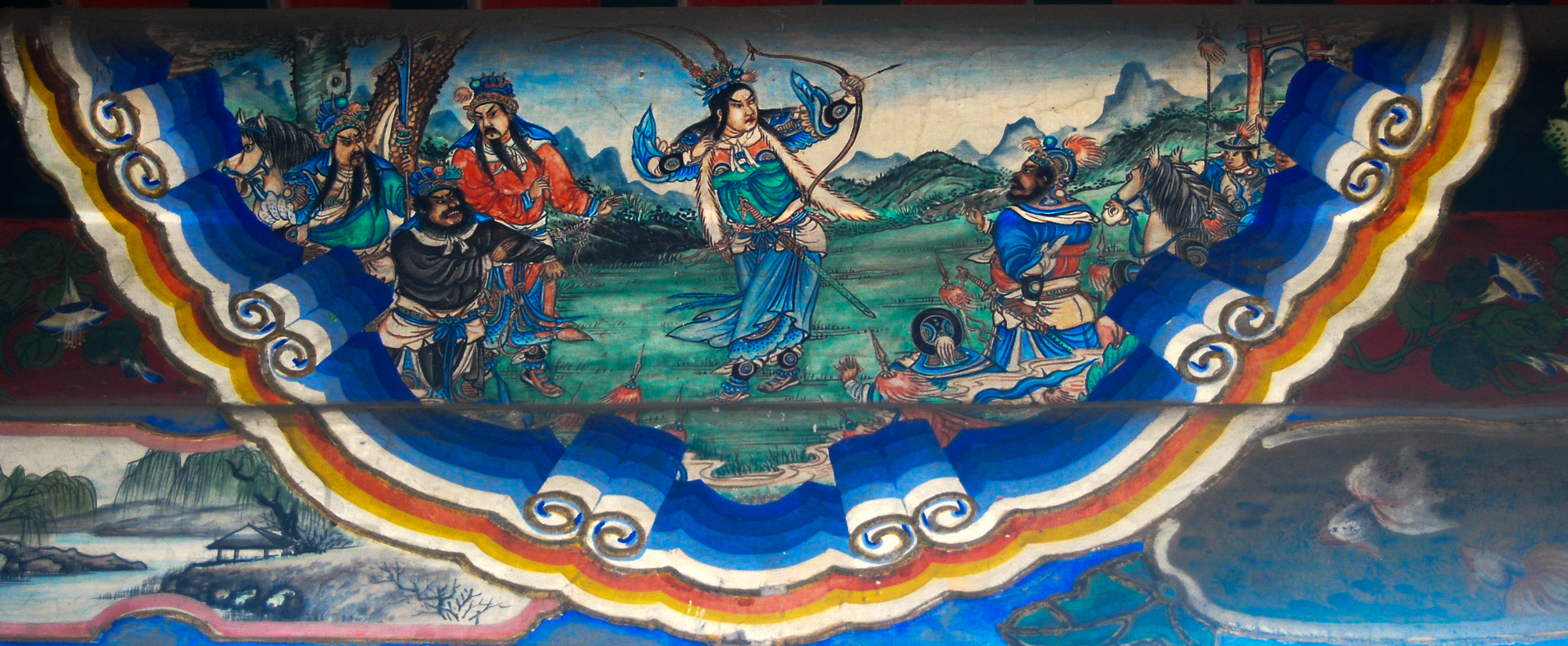 Lã Bố viên môn xạ kích - Di Hòa Viên